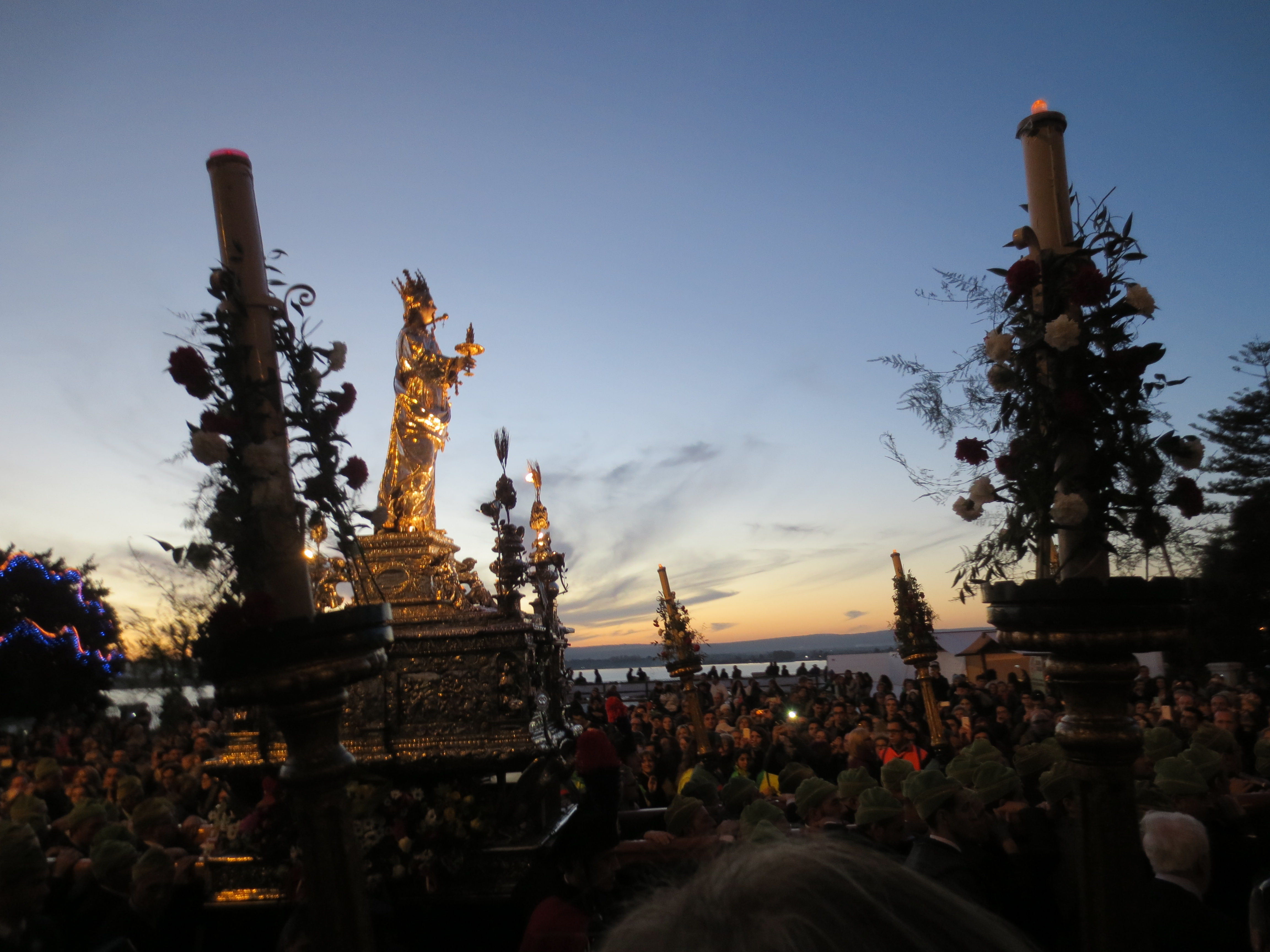 Il simulacro di Santa Lucia che attraversa l'isola di Ortigia a Siracusa.